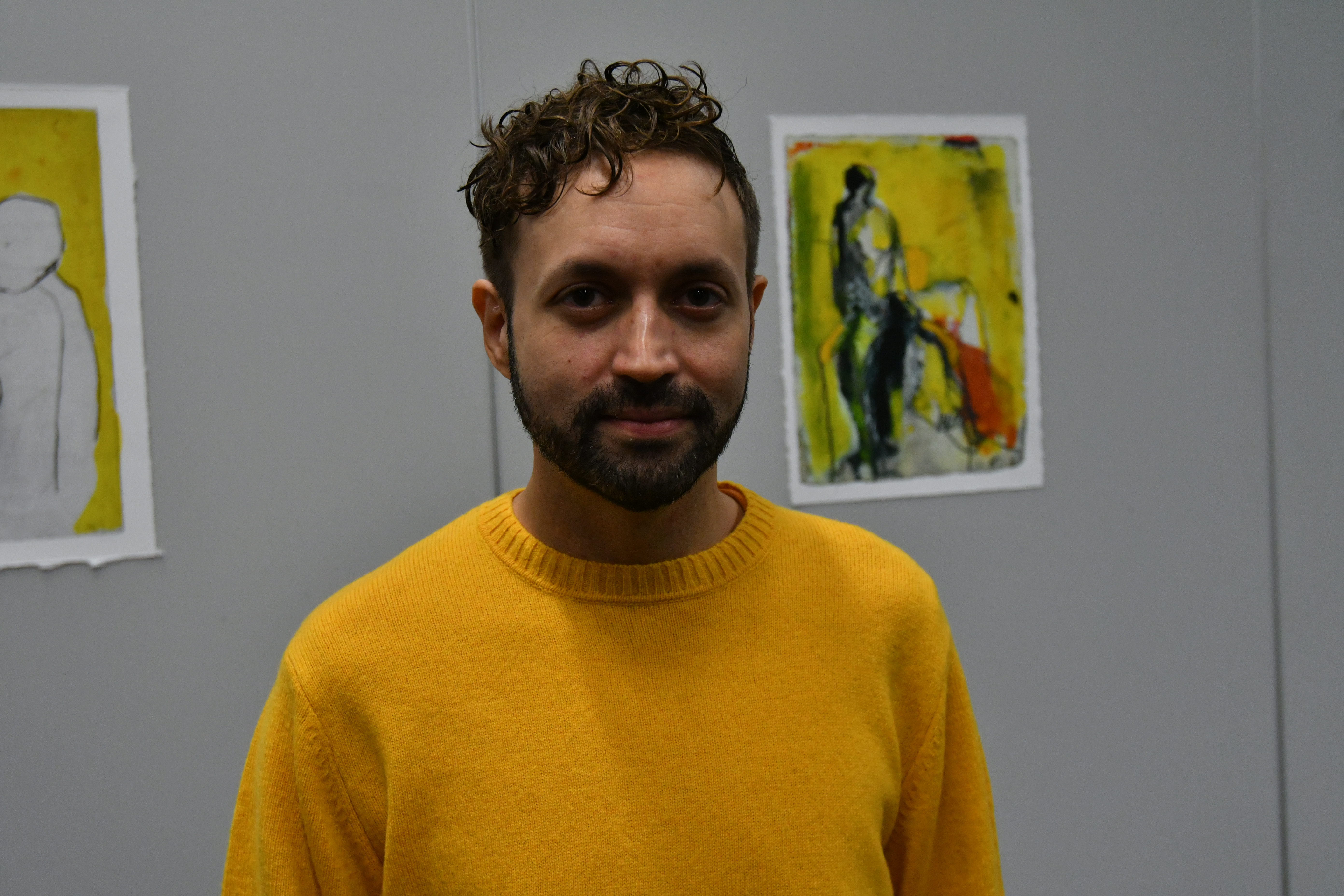 Alex Haridi efter ett seminarium på Bokmässan i Göteborg den 27 september 2018.